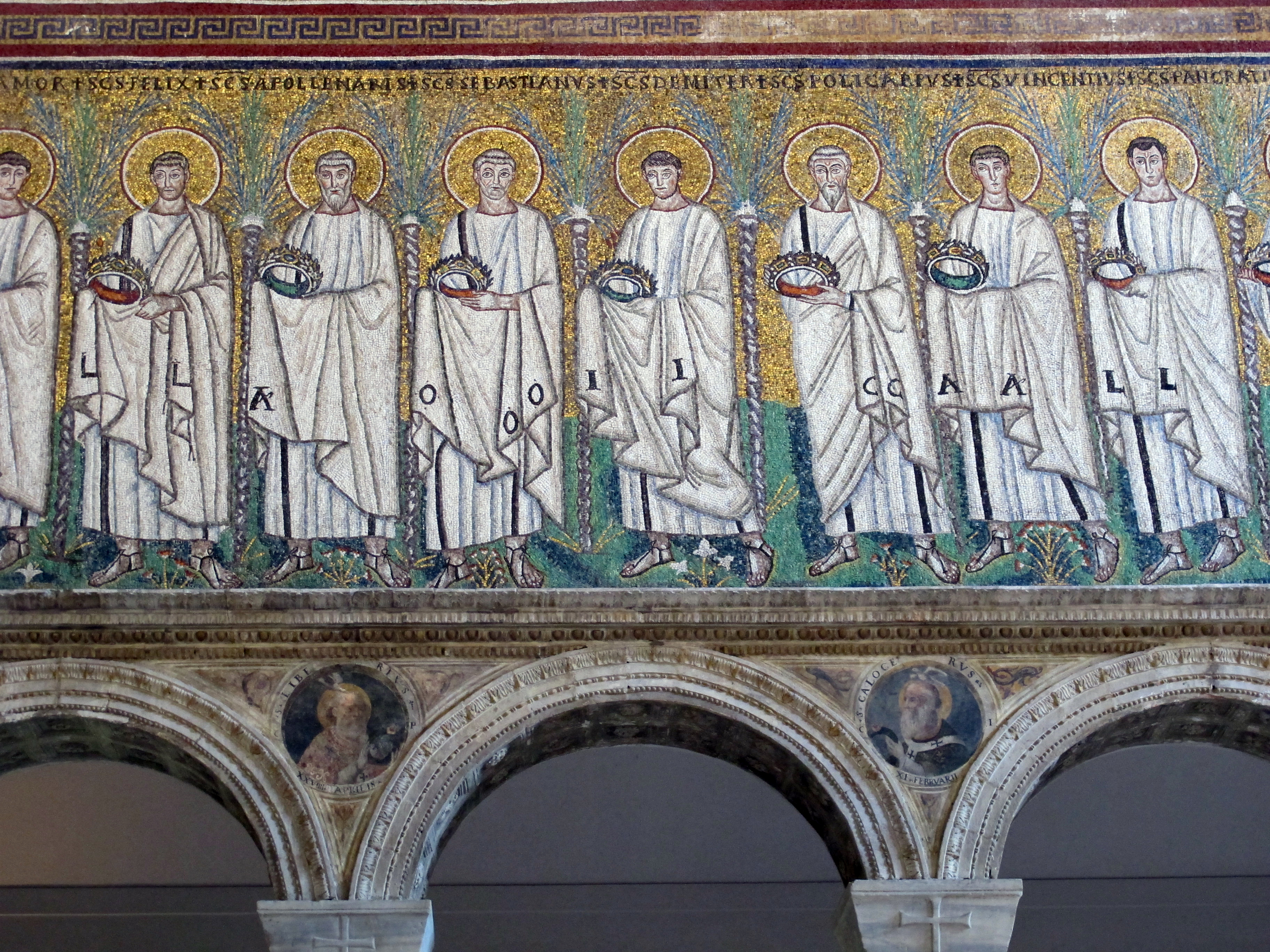 Basilica di Sant'Apollinare Nuovo - MIBAC This is a photo of a monument which is part of cultural heritage of Italy.